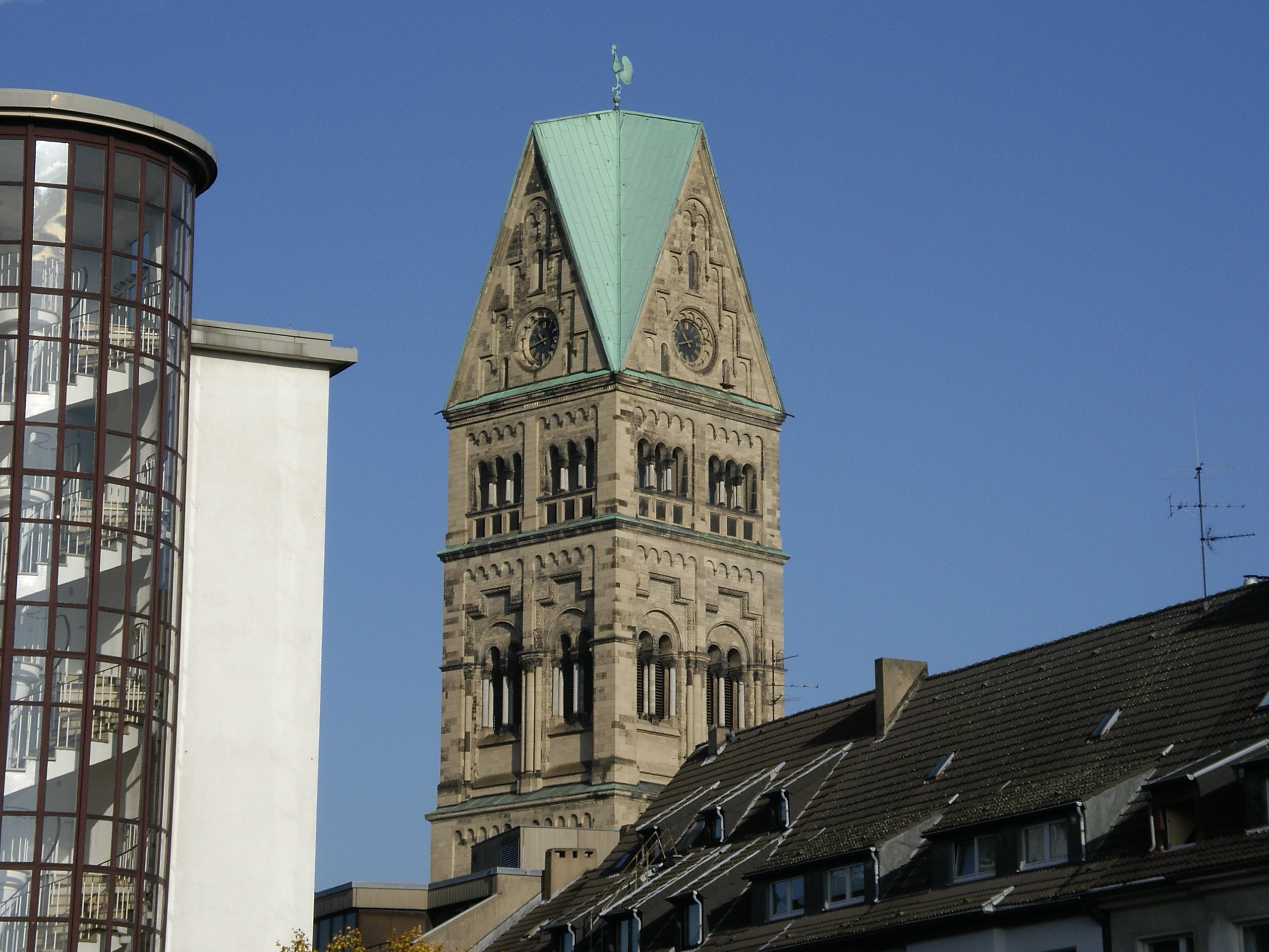 Rochuskirche, Düsseldorf, Germany